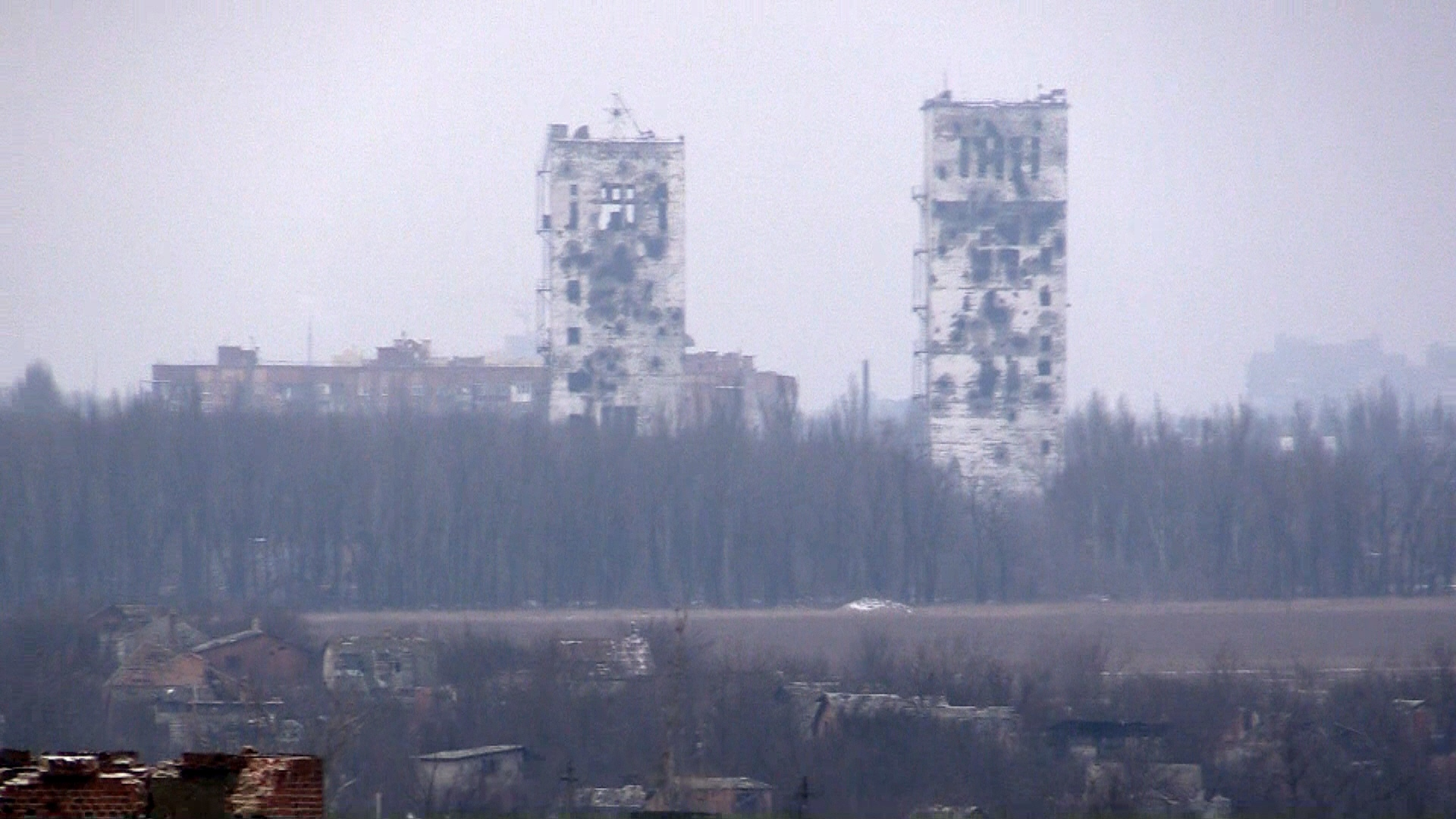 Населений пункт Піски незважаючи на зменшення кількості обстрілів з боку російсько-окупаційних військ, залишається досить напруженою ділянкою оборони в районі проведення Антитерористичної операції на території Донецької та Луганської областей. Тут, на лінії взводних опорних пунктів, продовжують нести службу підрозділи Високомобільних десантних військ Збройних Сил України.